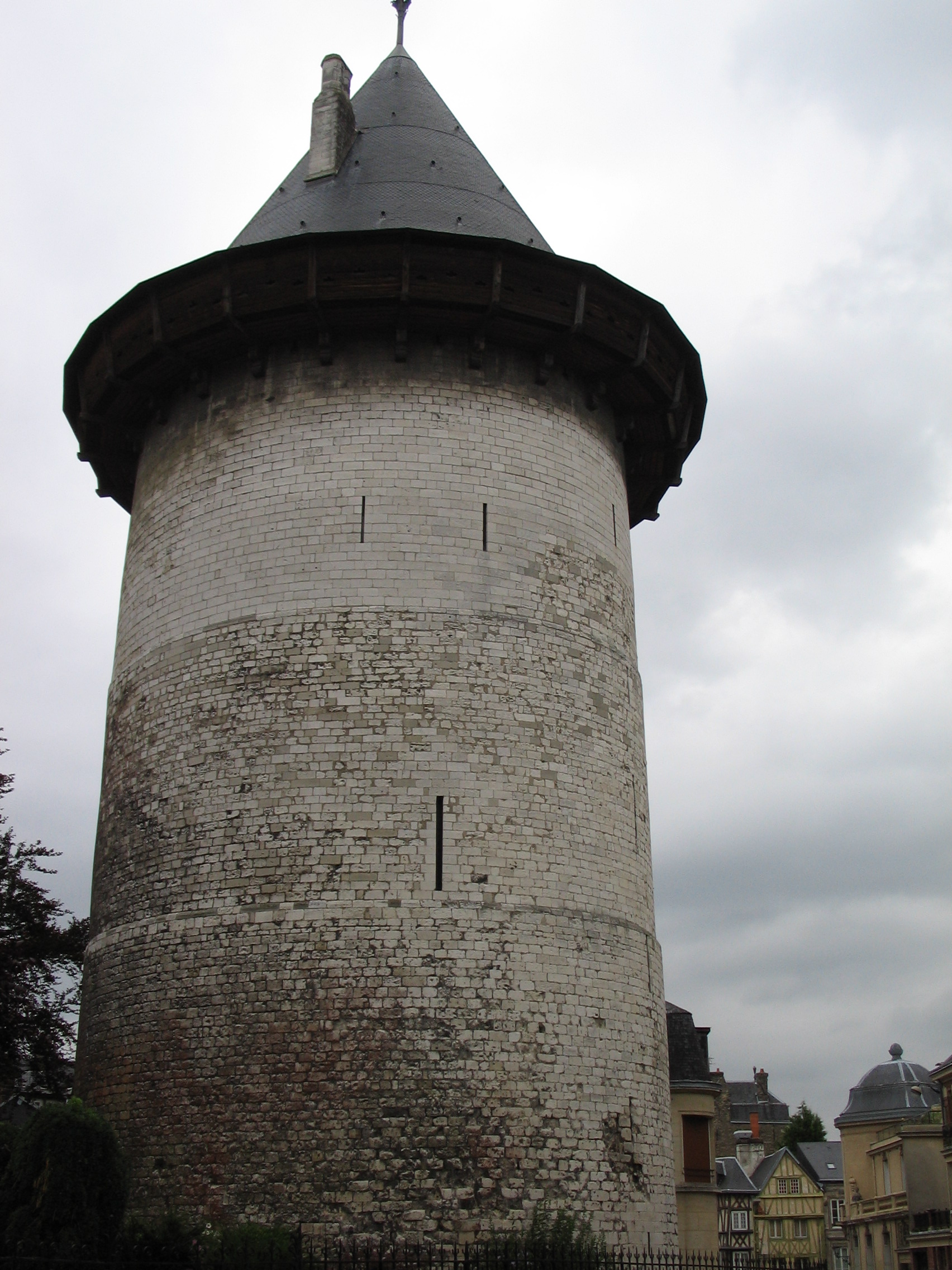 Tour Jeanne d'Arc ("Le Donjon" - XIIIe s.) vers gare de Rouen R-D, Seine-Maritime.